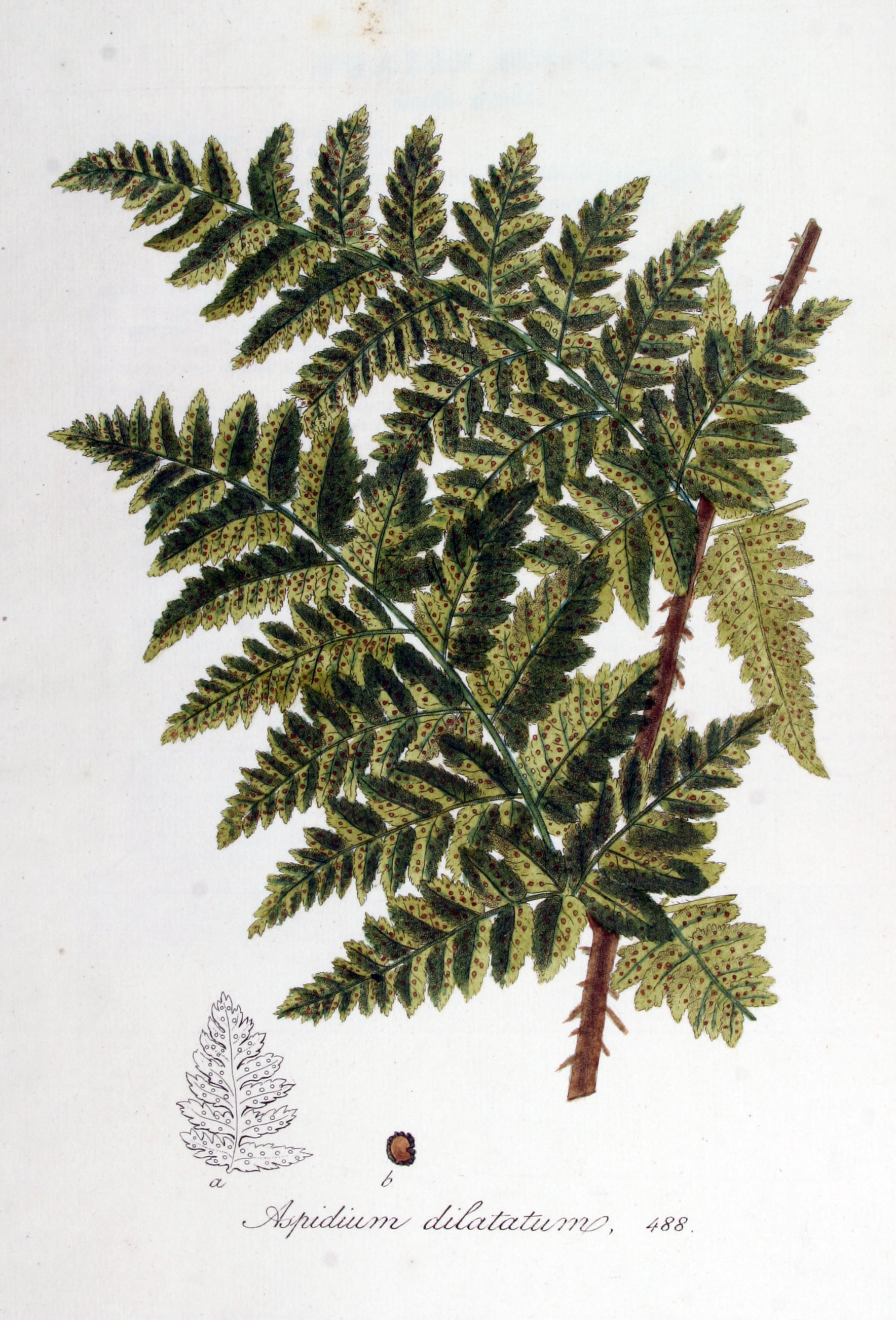 Dryopteris dilatata (Hoffmann) A. Gray (Syn.Aspidium dilatatum (Hoffm.) Sm.)